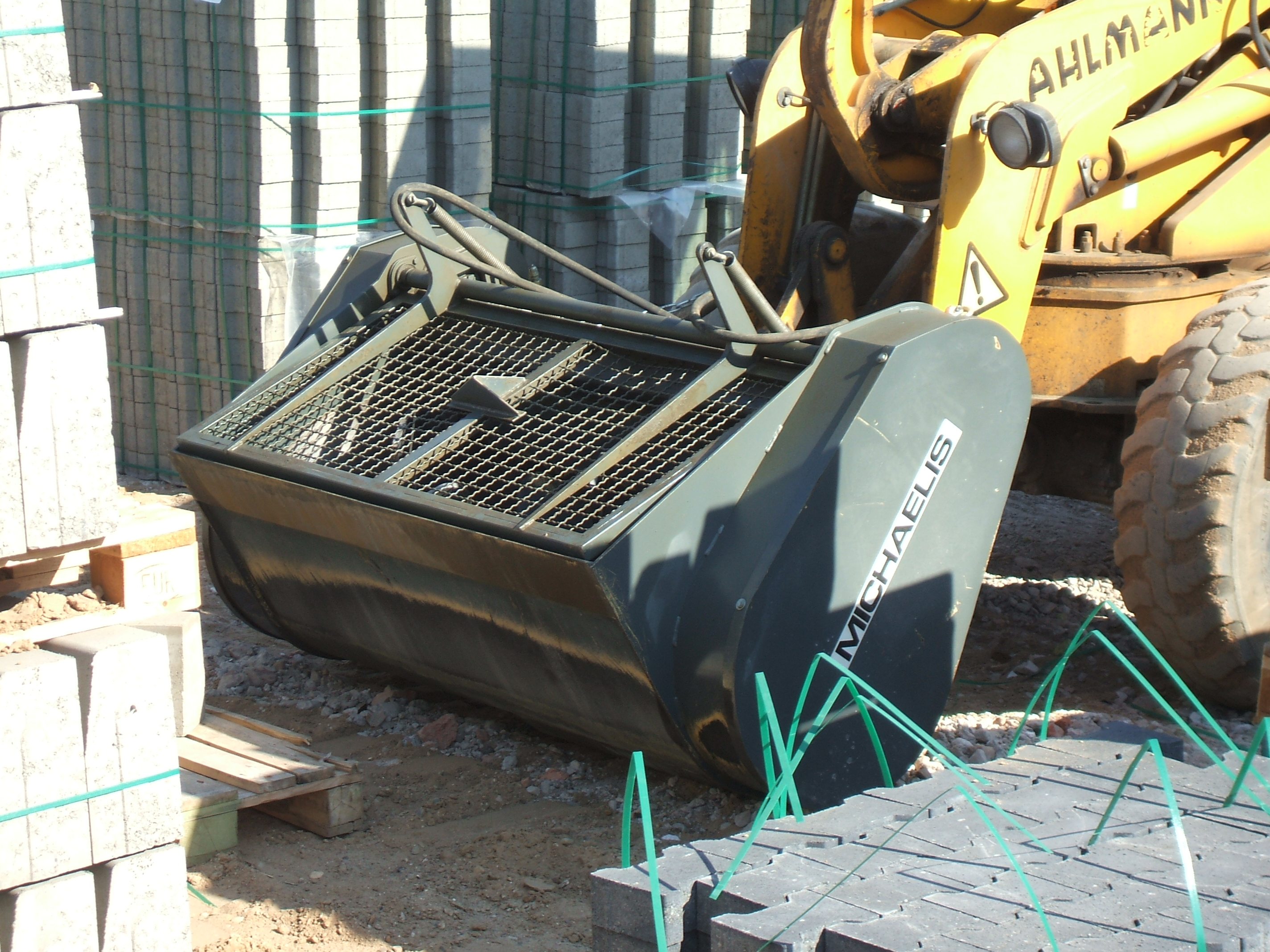 Ковшовая бетономешалка (нем. Mischschaufel) фирмы Michaelis Maschinenbau GmbH. Используется в качестве рабочего органа колёсного погрузчика и т. п.